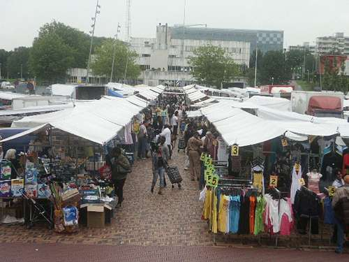 Markt op het Anton de Komplein, Amsterdam Zuidoost